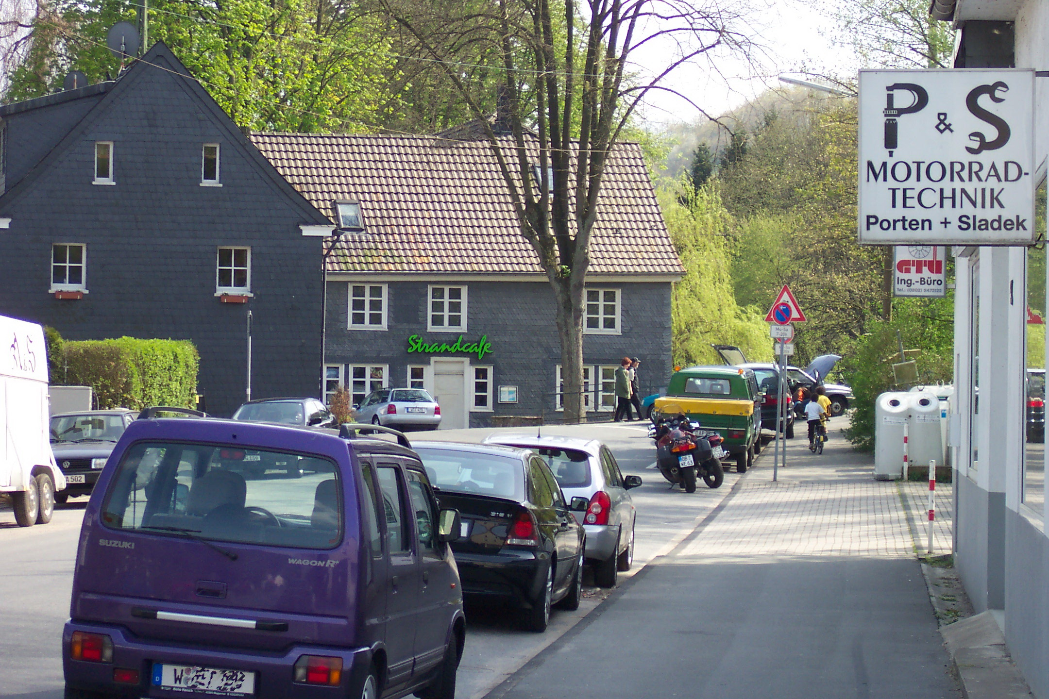 Kohlfurth, Wuppertal